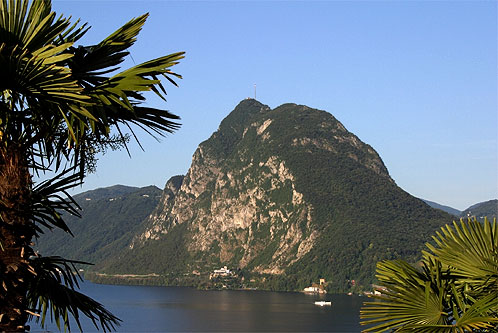 Monte San Salvatore (Lugano)